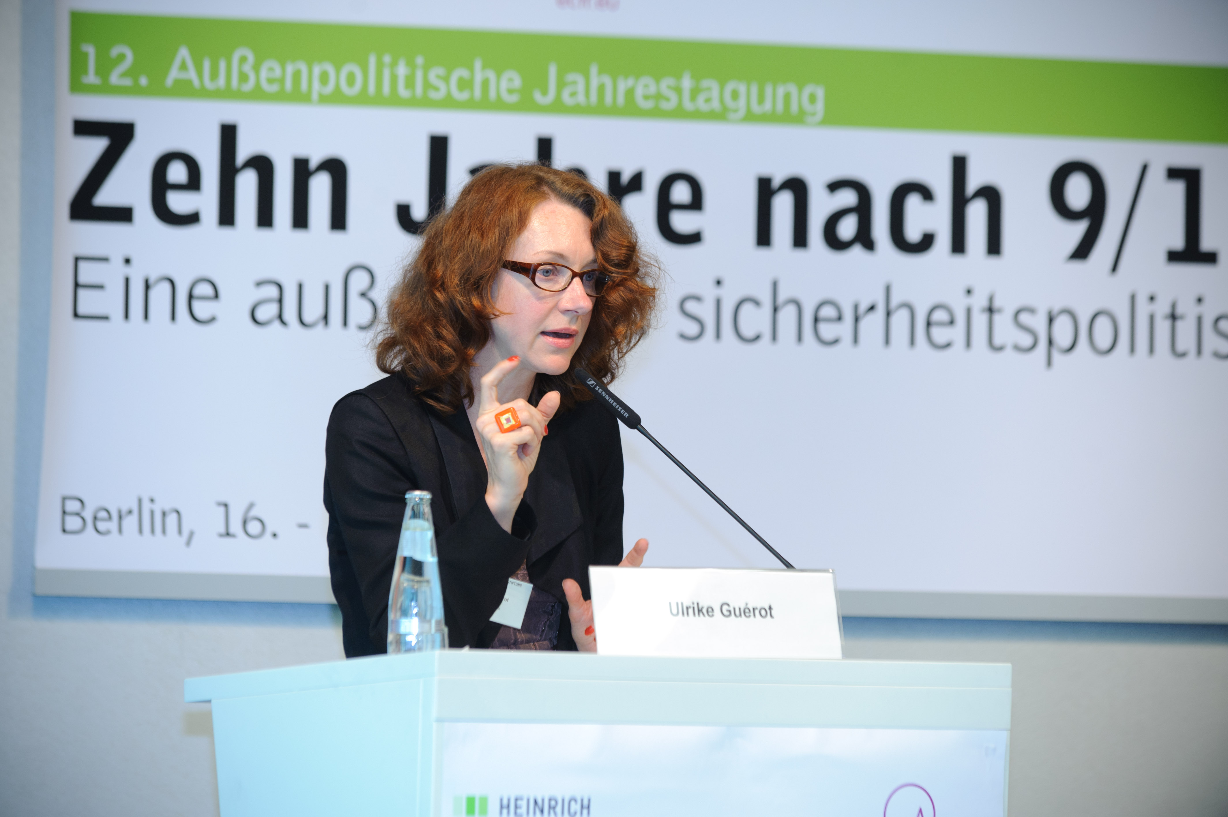 Ulrike Guérot (Leiterin des Berliner Büros des ECFR Europiean Council on Foreign Relations)